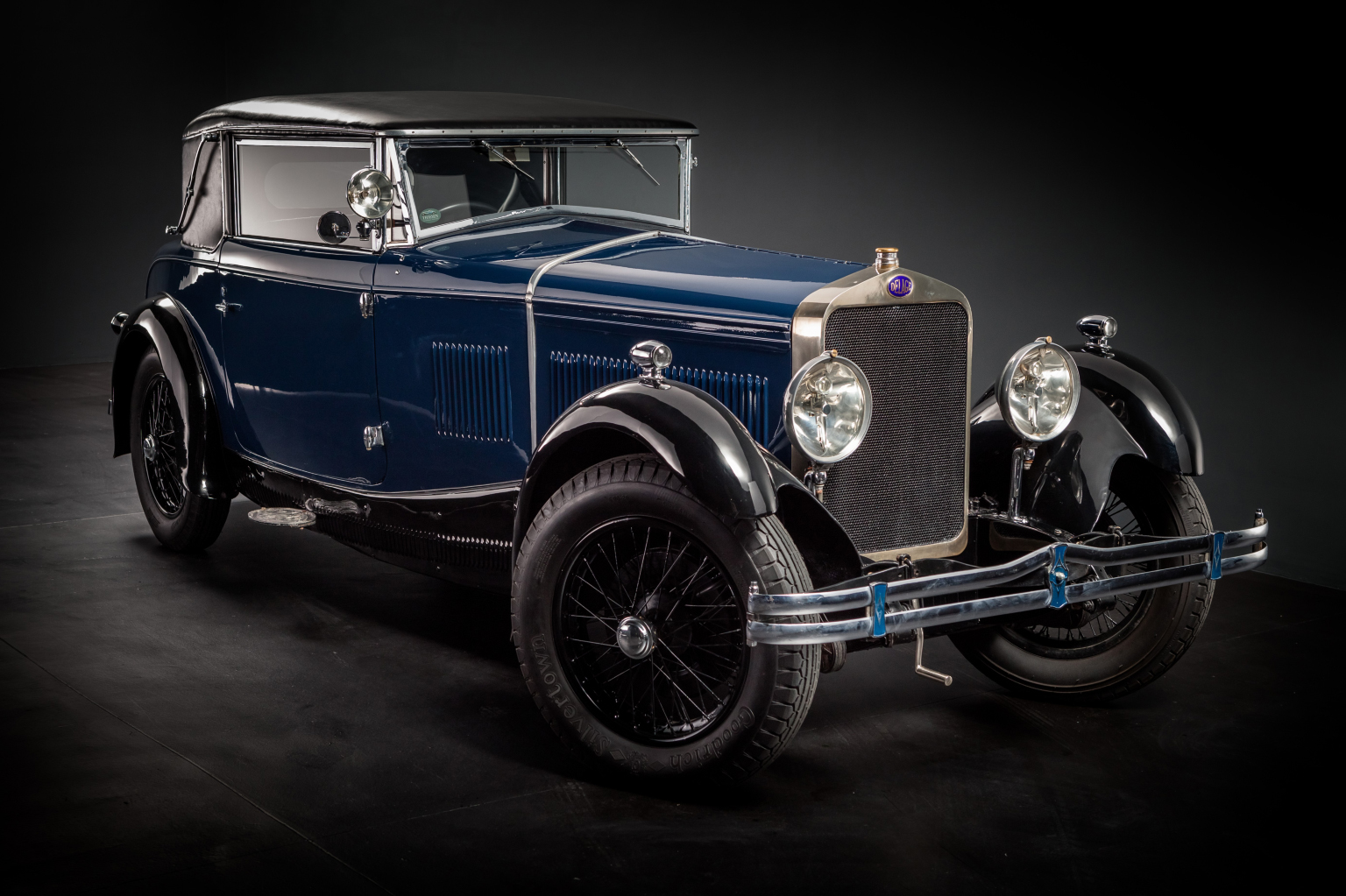 Delage DMN является постоянным участником экспозиции начала ХХ века в Музее автомобильной техники в Верхней Пышме